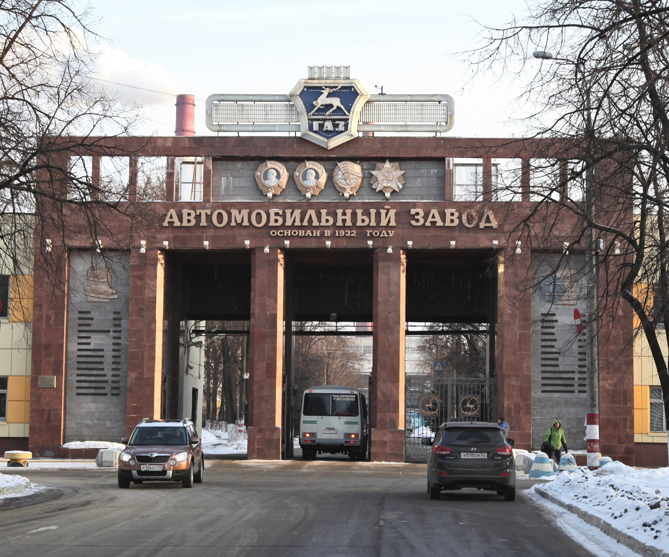 Проходная Горьковского автомобильного завода